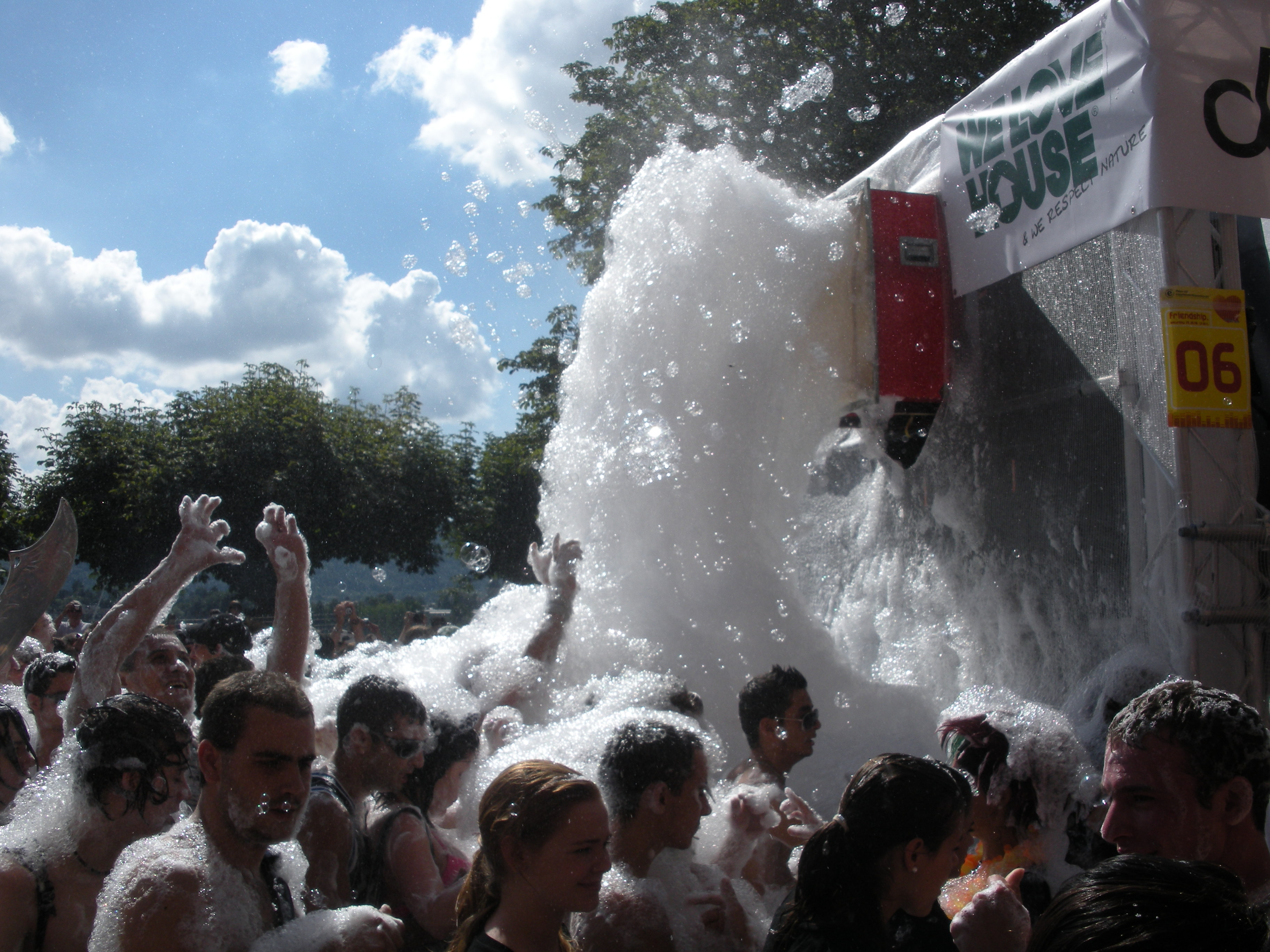 Zürich Street Parade 2008.